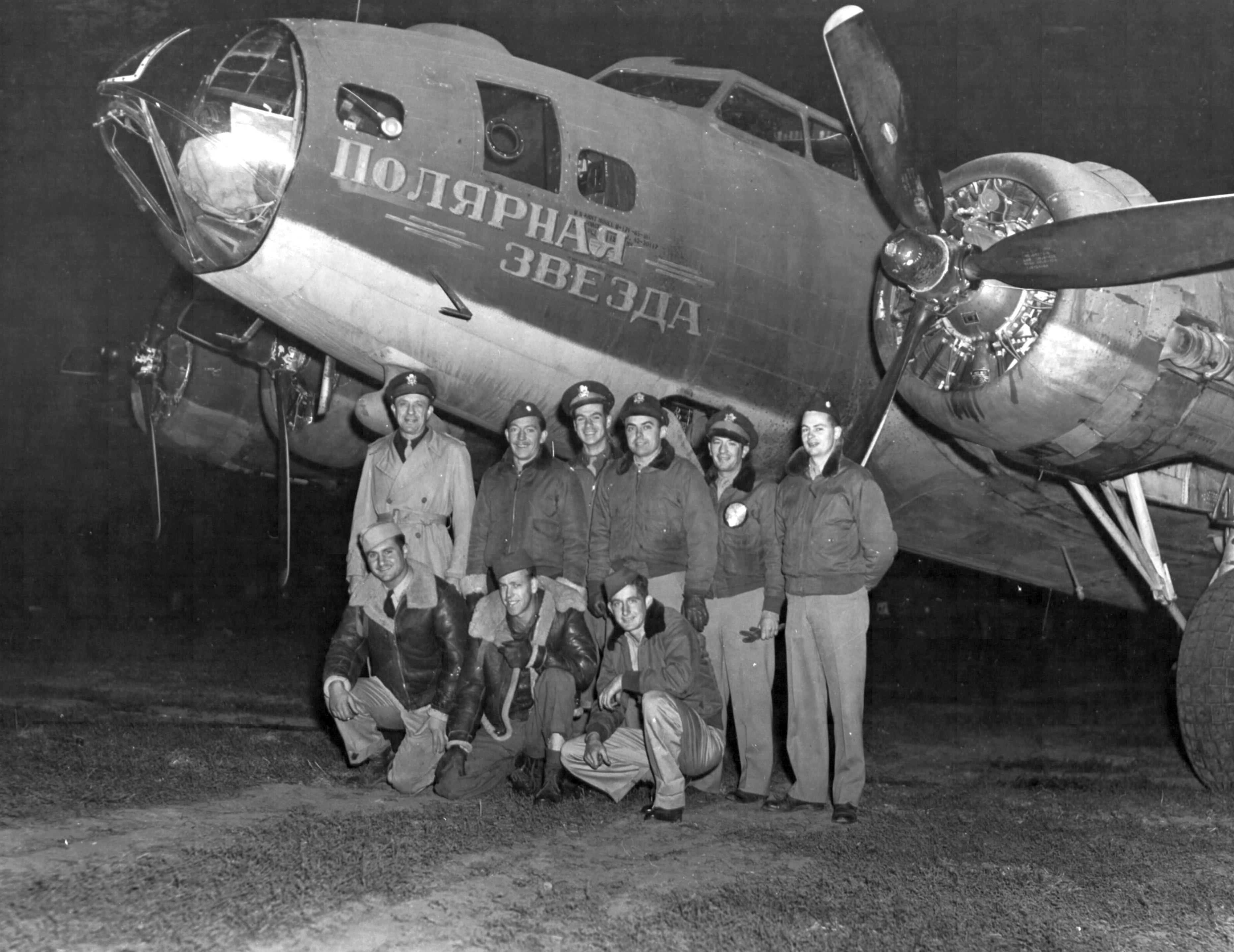 95.BG "Sarkcsillag" nevű B-17F Flying Fortress bombázógép. Location: Ukraine Tags: second World War, soldier, pilot, Boeing-brand, american brand, eastern front, Soviet Union, airport, American soldier, "Polar star", "Полярная звезда" Title: 95.BG \